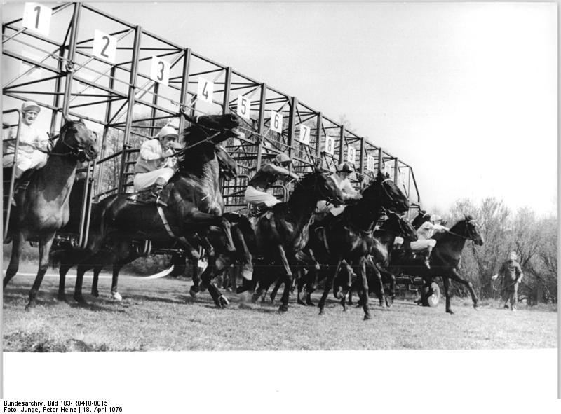 Galopprennen, Start aus Boxen ADN-ZB Junge 18-4-76 Bez.Frankfurt-Oder:Auftakt der Hoppegartener Rennsaison 1976-Rasanter Start zum "Hoppegartener Aufgalopp" über 1200 m.Erstmals wurde aus Boxen gestartet.